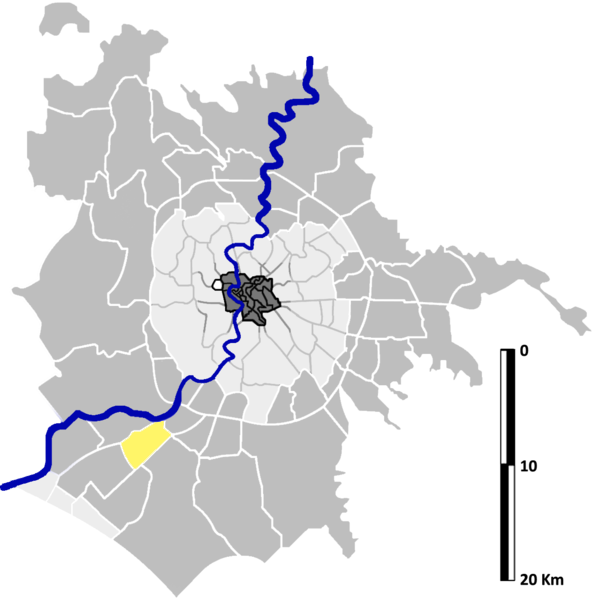 Acilia Sud